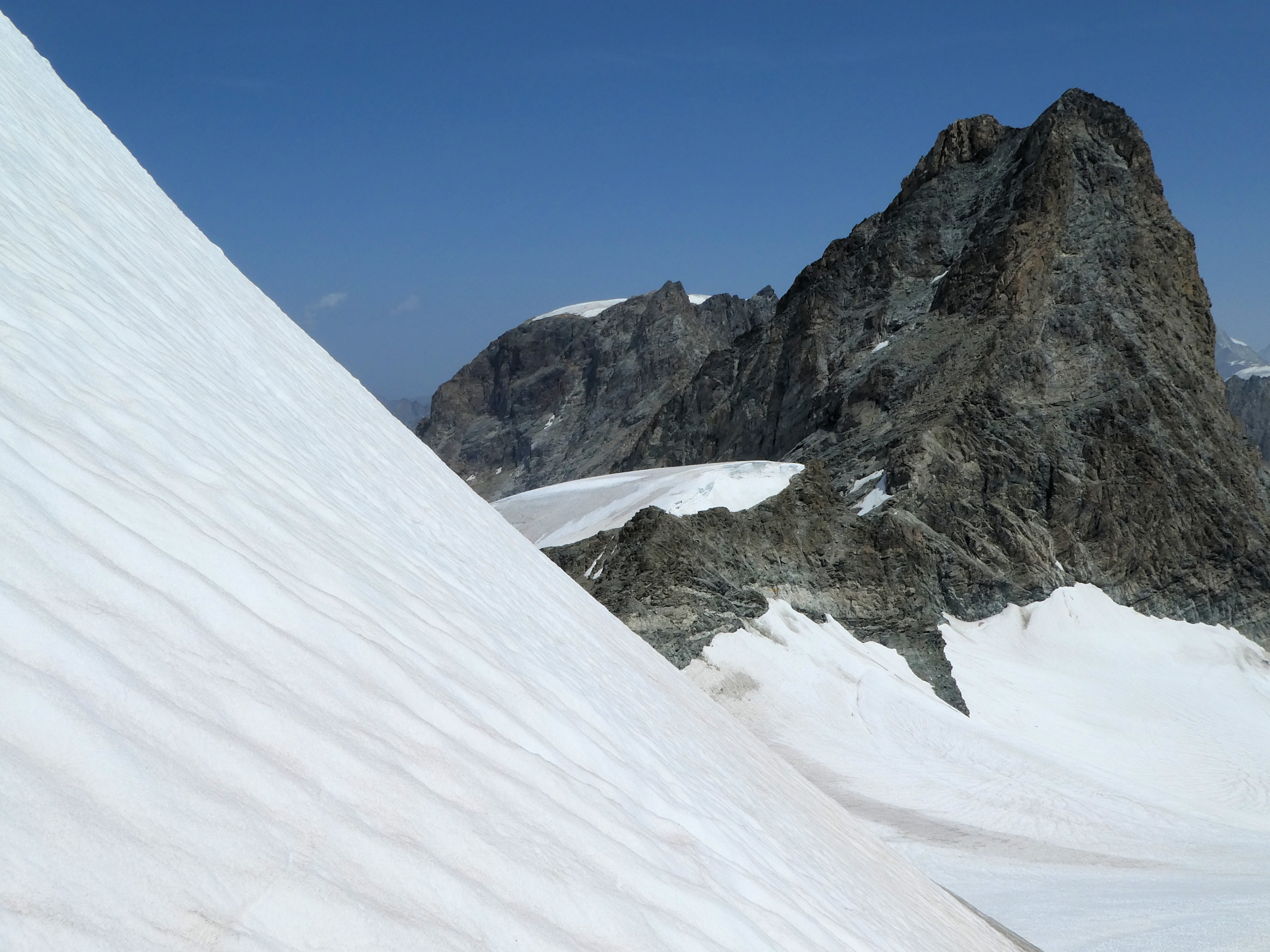 L'Evêque visto dalla Becca d'Oren. In secondo piano il Monte Collon.